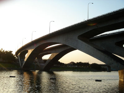 橫跨新店溪上空的北二高碧潭大橋，北二高是福爾摩沙高速公路北部路段的慣稱，而矗立在新店溪碧潭段上空的北二高碧潭大橋則是北二高進入台北市周邊地區的門戶，過了這條橋之後就很靠近台北盆地的核心地區。圖中所見是輝映在夕陽中的碧潭大橋，是一對有水平曲率的弧形鋼筋水泥拱橋，橋長850公尺，主跨距則為160公尺，與在它一旁只能行走行人的碧潭吊橋正好一新一舊形成對比，是碧潭地標之一。